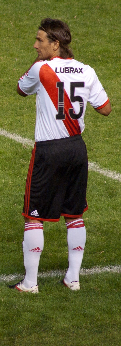 Leonardo Ponzio, jugador profesional.